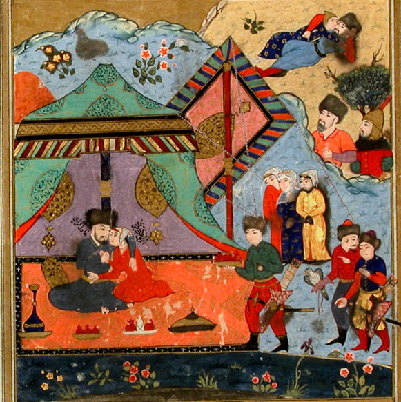 Secaatname 0068, Adil Giray